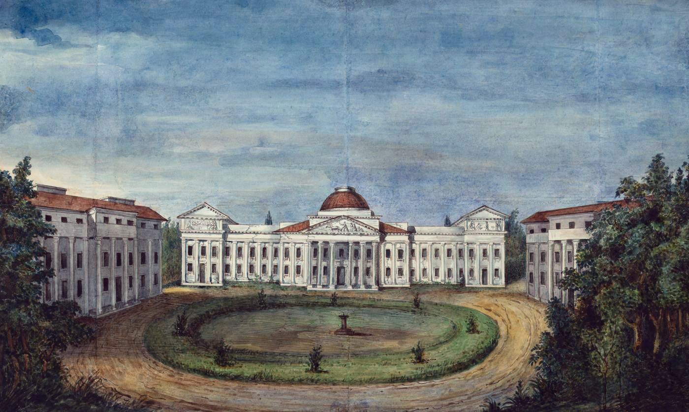 Беларуская (тарашкевіца): Вільня (Vilnia), Веркі (Vierki)